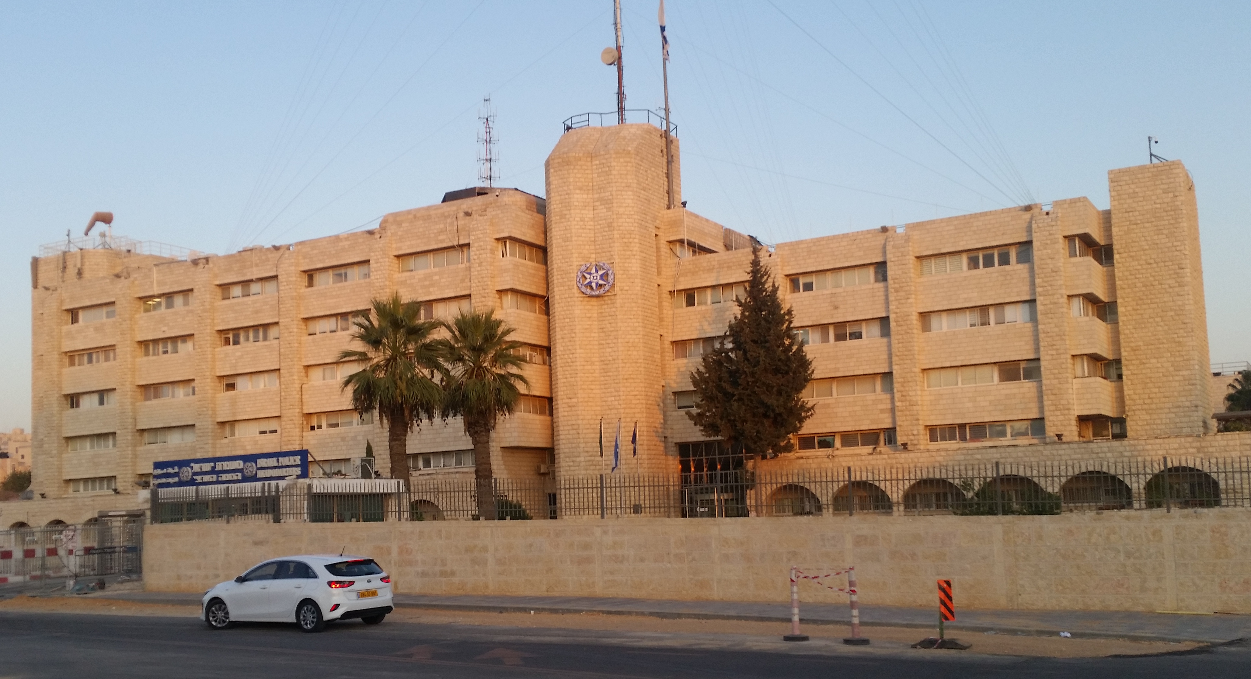 המטה הארצי של משטרת ישראל בירושלים.